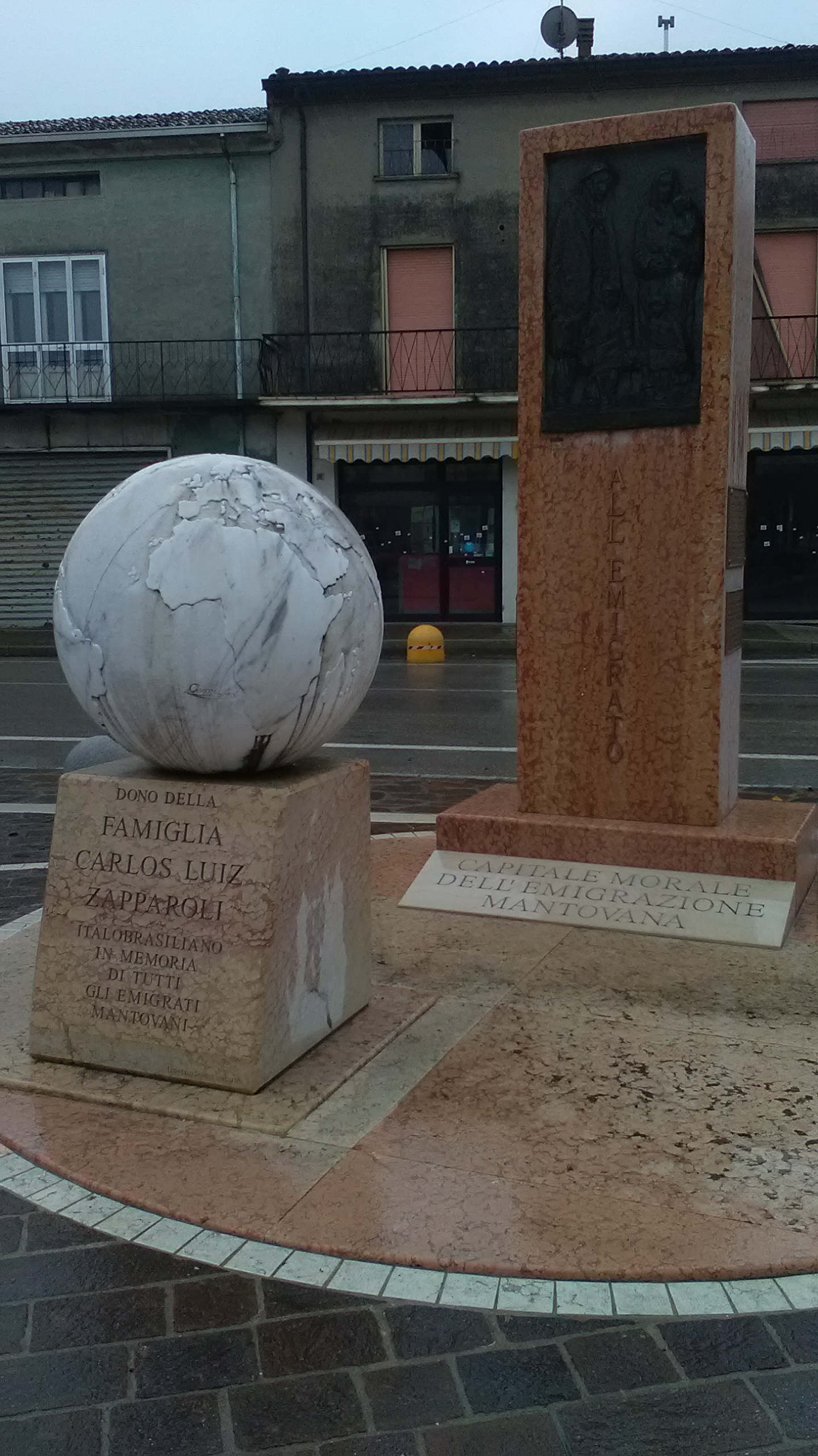 Monumento agli emigranti di Magnacavallo